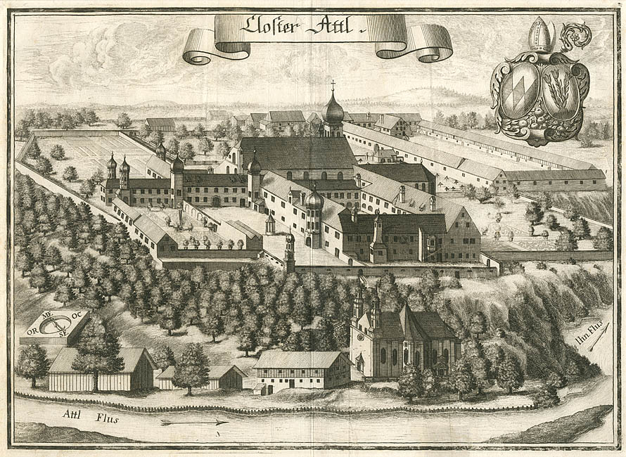 “Closter Attl”. Aus : Beschreibung des Churfürsten- u. Hertzogthumbs Ober- und Nidern Bayrn. Rentamt München, 1701